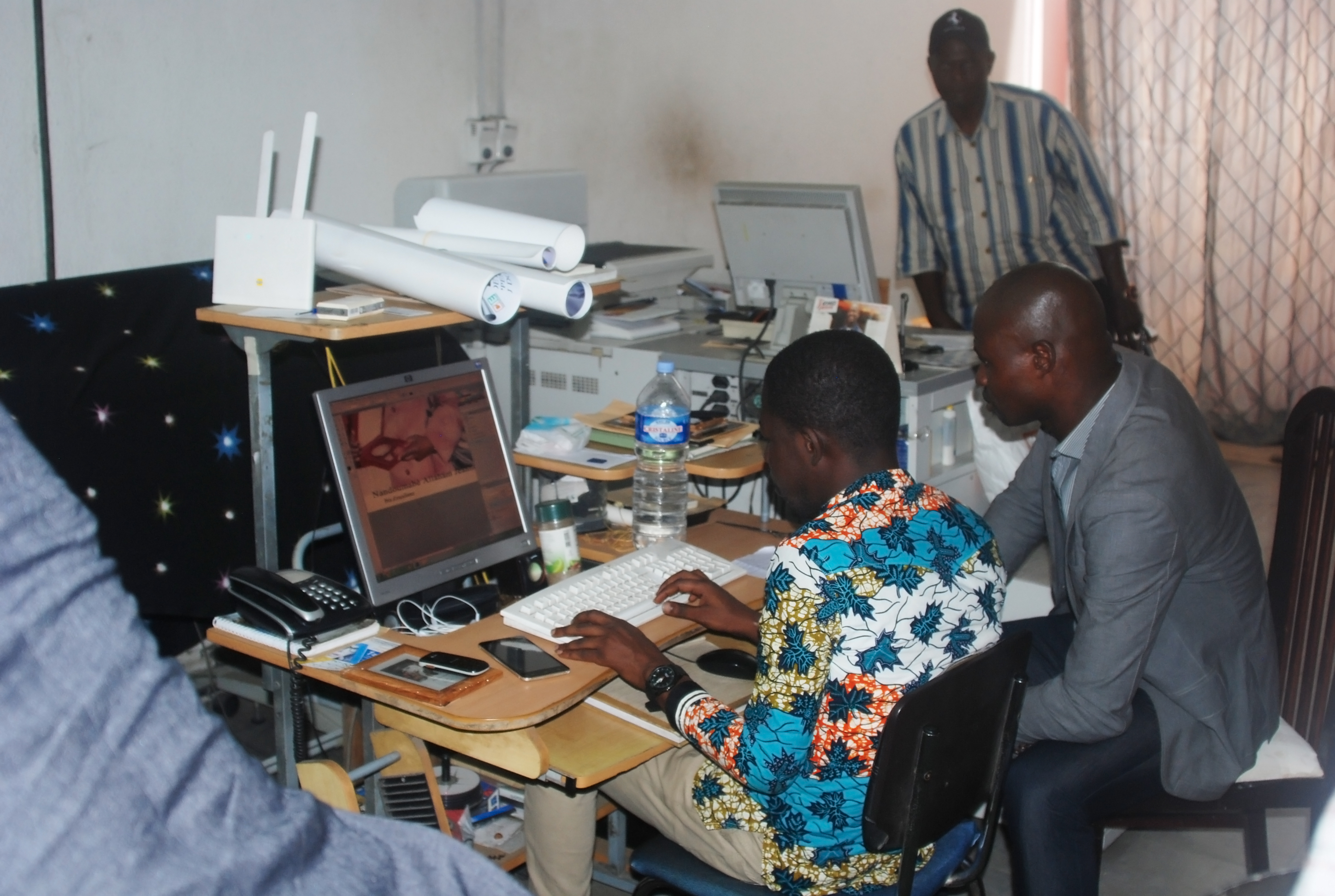 un infographe de laboratoire photo numérique dans la commune du plateau à Abidjan This is an image of "African people at work" from Ivory Coast